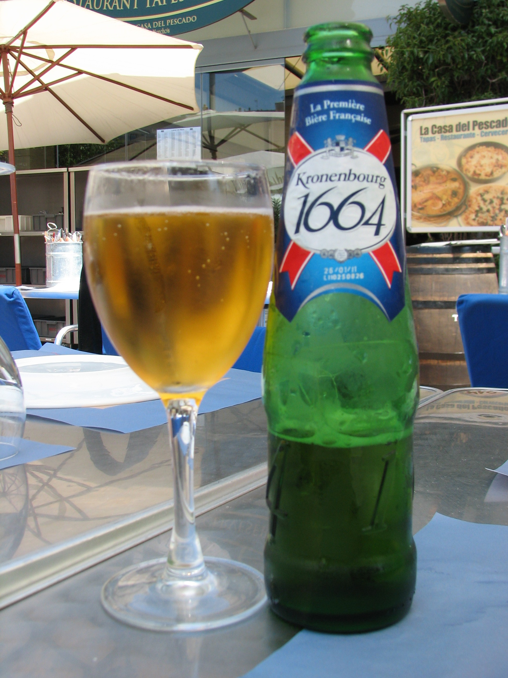 Kronenbourg 1664 @ França